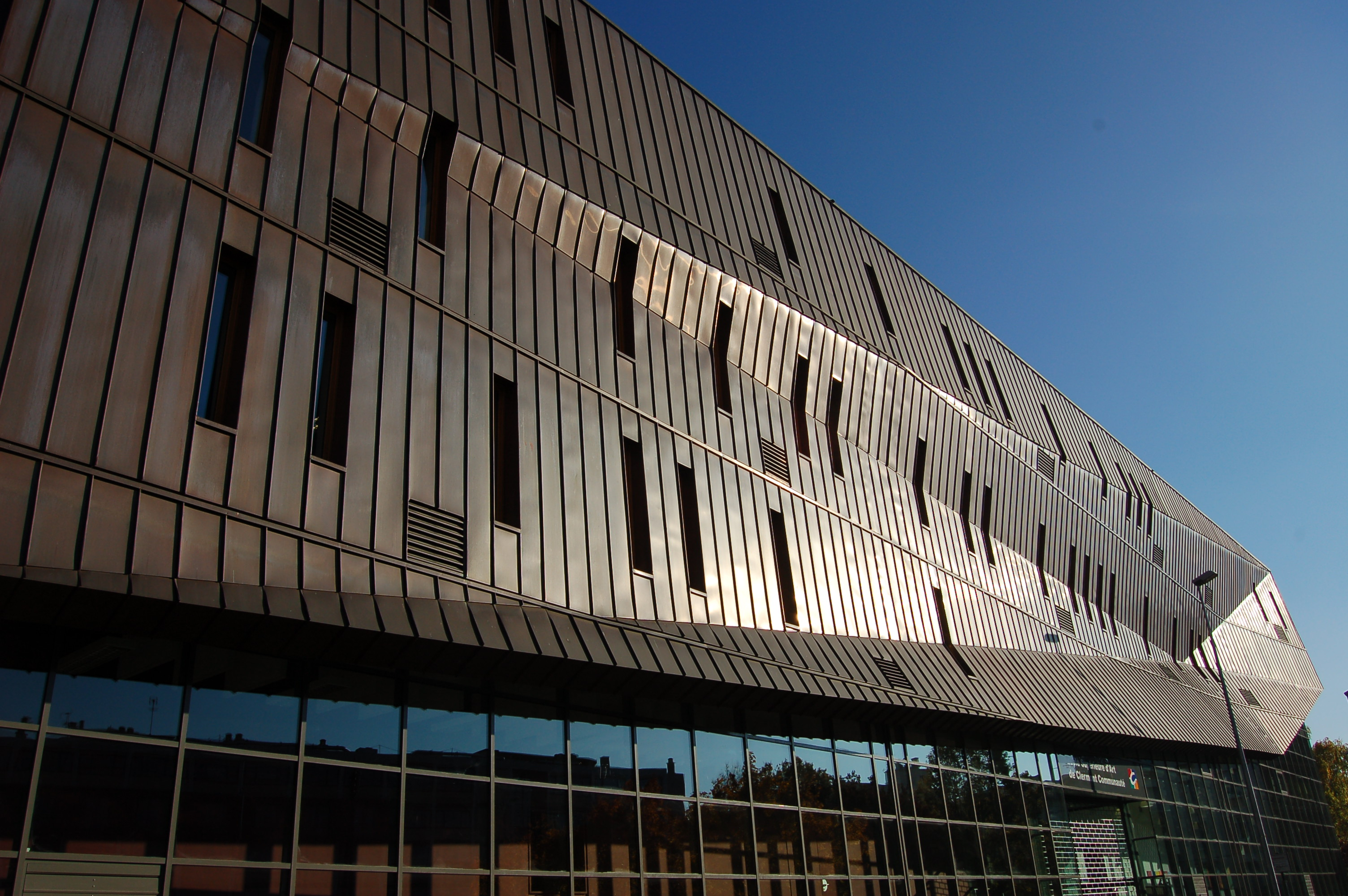 Ecole Supérieure d'Art de Clermont Communauté (Clermont-Ferrand, France)